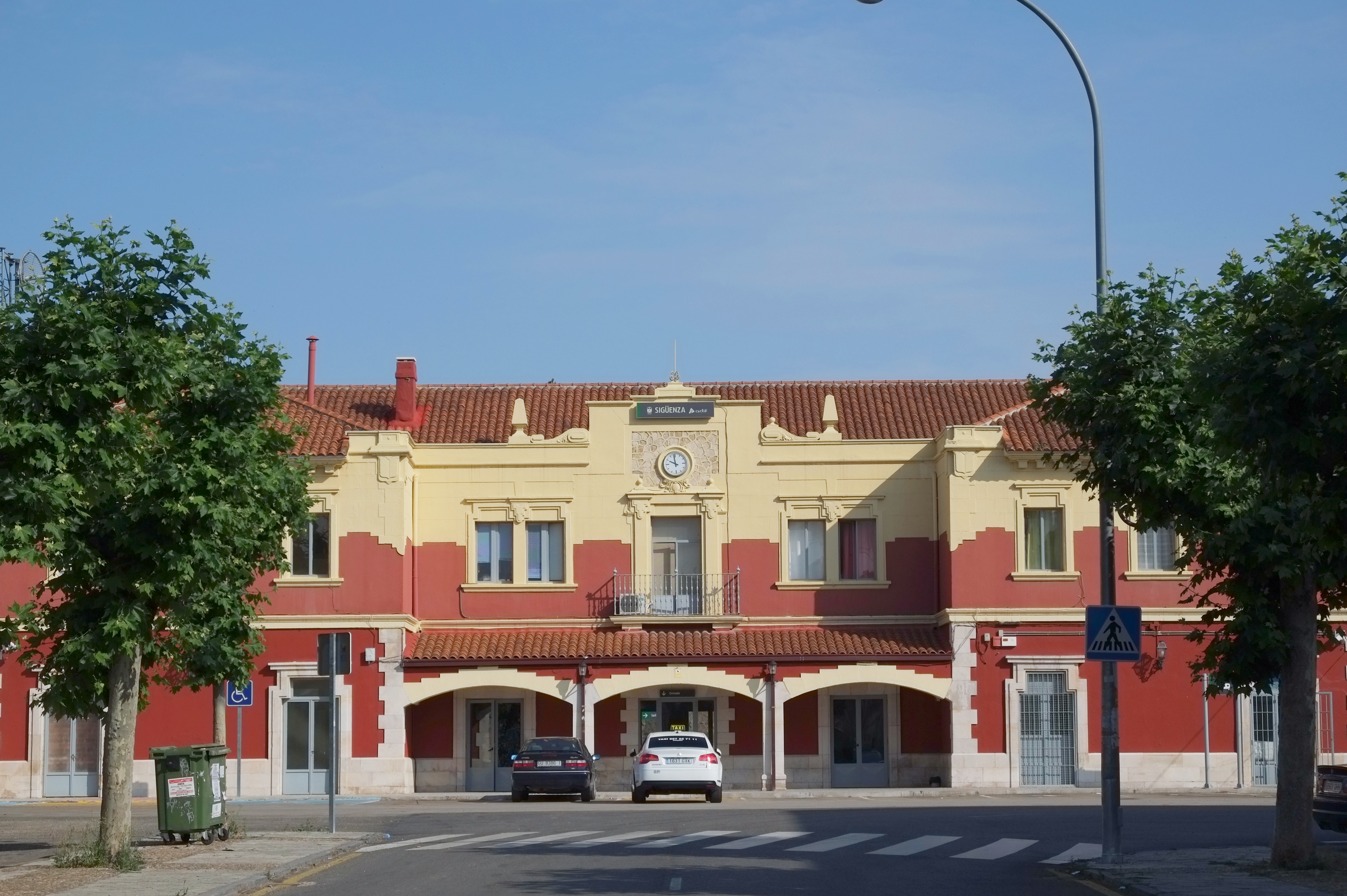 Bahnhof in Sigüenza in der Provinz Guadalajara in Spanien